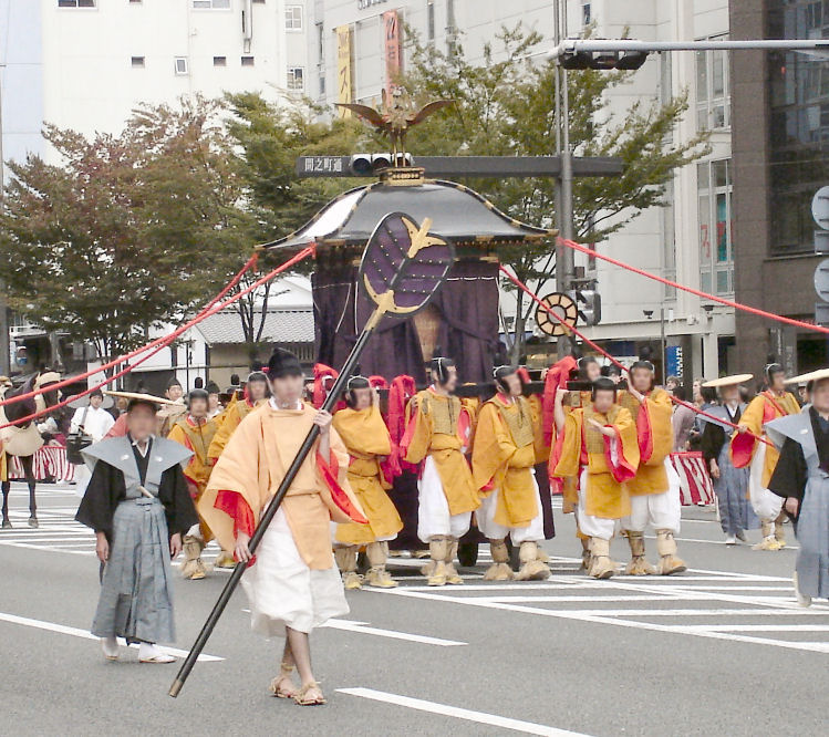 Jidai Matsuri Gohouren